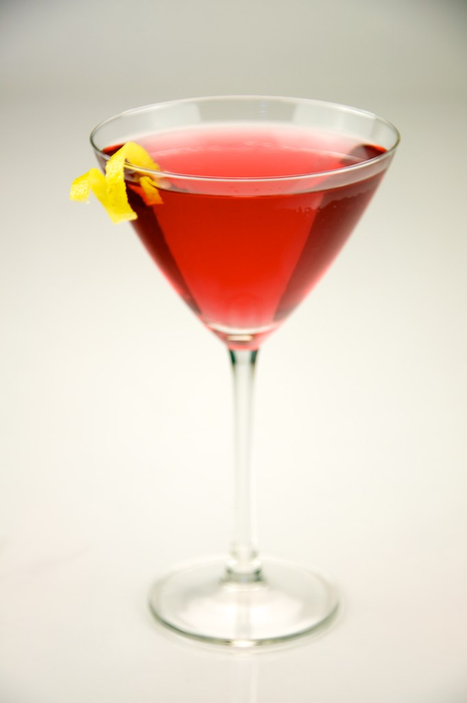 Cosmopolitan served in a Martini Glass